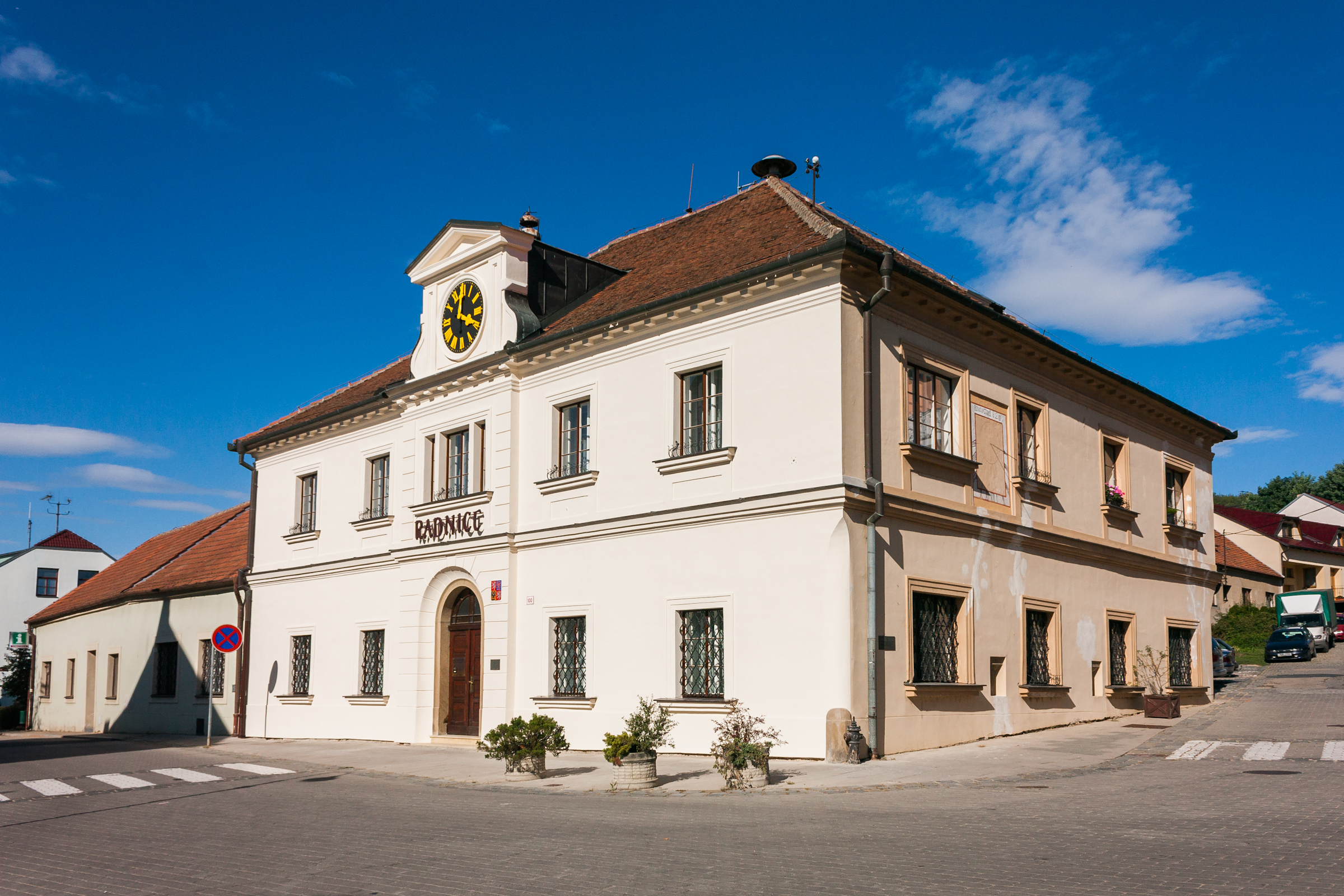 Masarykova 100, Židlochovice